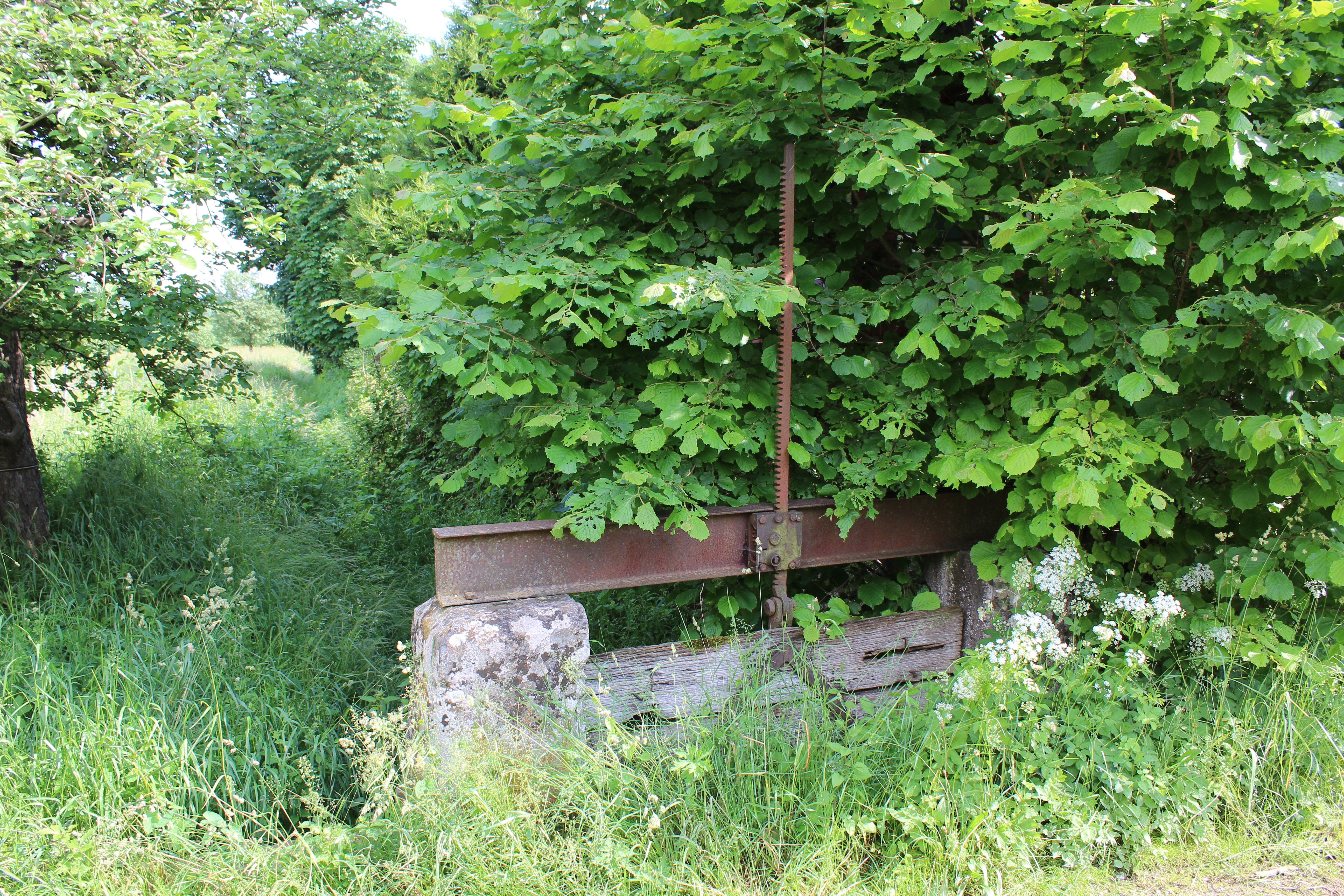 Wiesenwässerung entlang der Tauber. Auf dem Bild ist eine der so genannten Fallen bzw. Sperren in Dittigheim zu sehen. Es handelt sich bei dieser Wiesenwässerungs-Sperre um ein Unikat im Taubertal aus dem 19. Jahrhundert. Die Tauberwiesenwässerungsgenossenschaft (TWG) wurde am 7. September 1893 von Wiesenbesitzern neben der Tauber (von Dittigheim bis Impfingen) gegründet, da damals der Fluss in diesem Abschnitt begradigt wurde. Somit konnte trotz sinkendem Grundwasserspiegel die Wiesenbewässerung gewährleistet werden, um Grünfutter für die Nutztiere zu erzeugen.